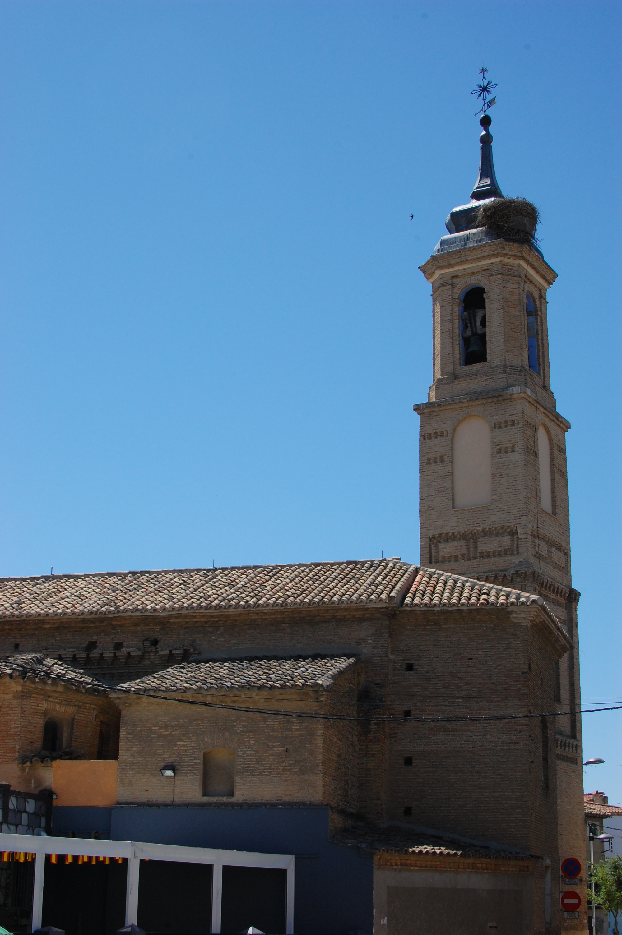 Aragonés: Pastriz, Ilesia